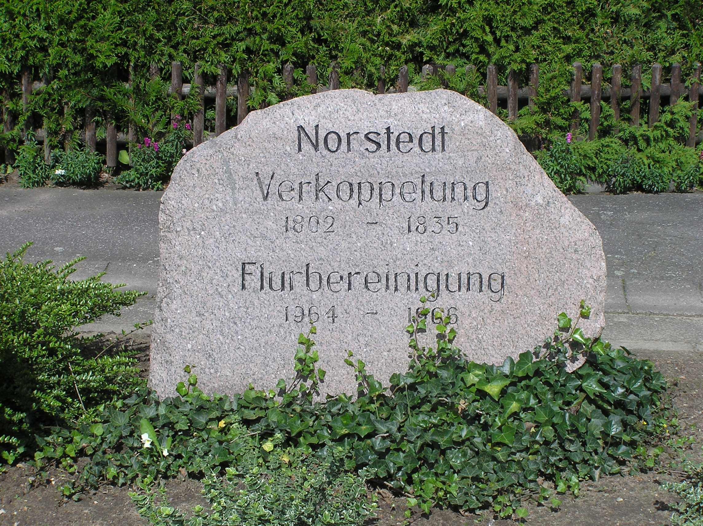 Denkstein